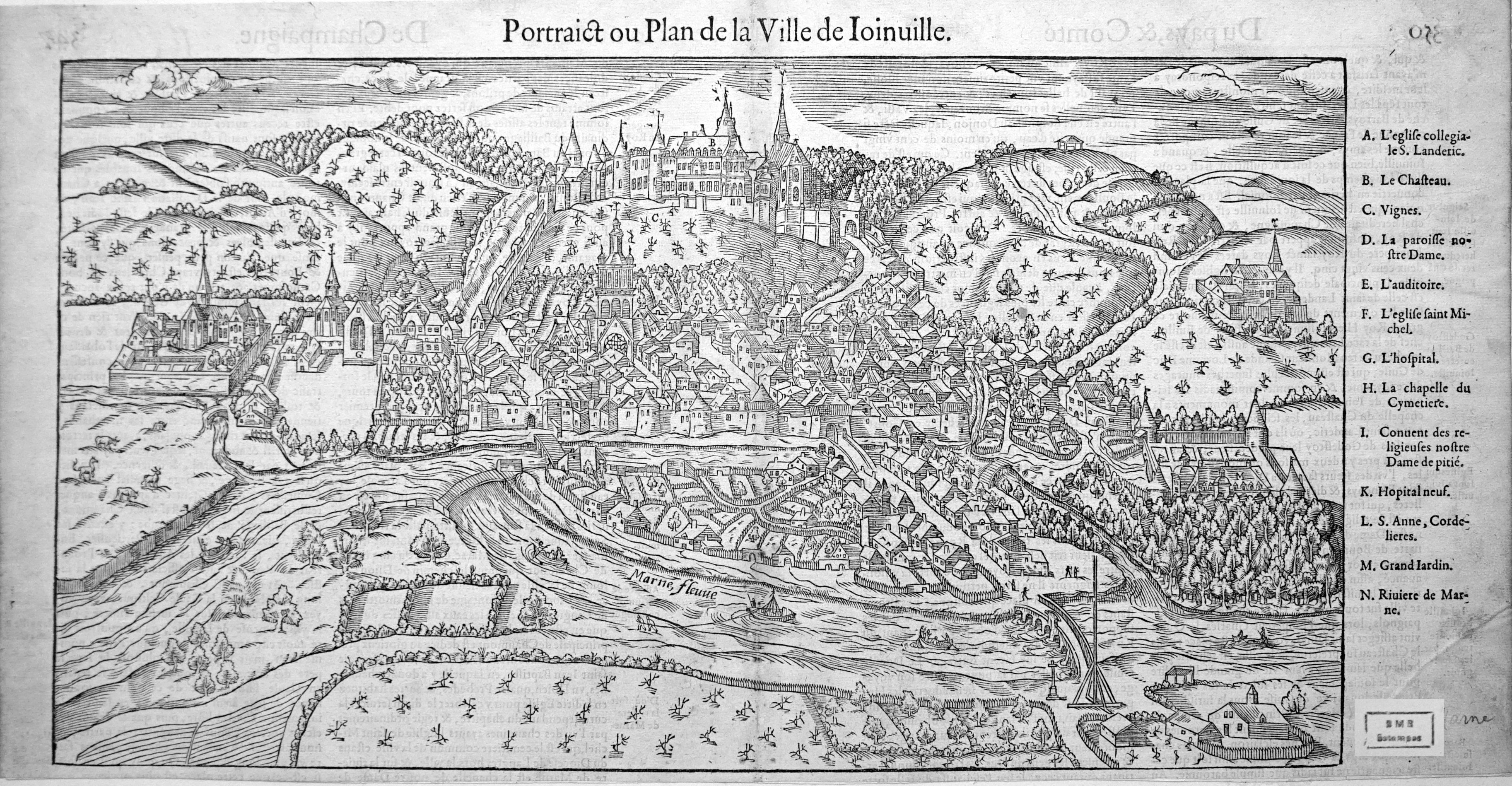 partie de la ville de Joinville en Haute-Marne.